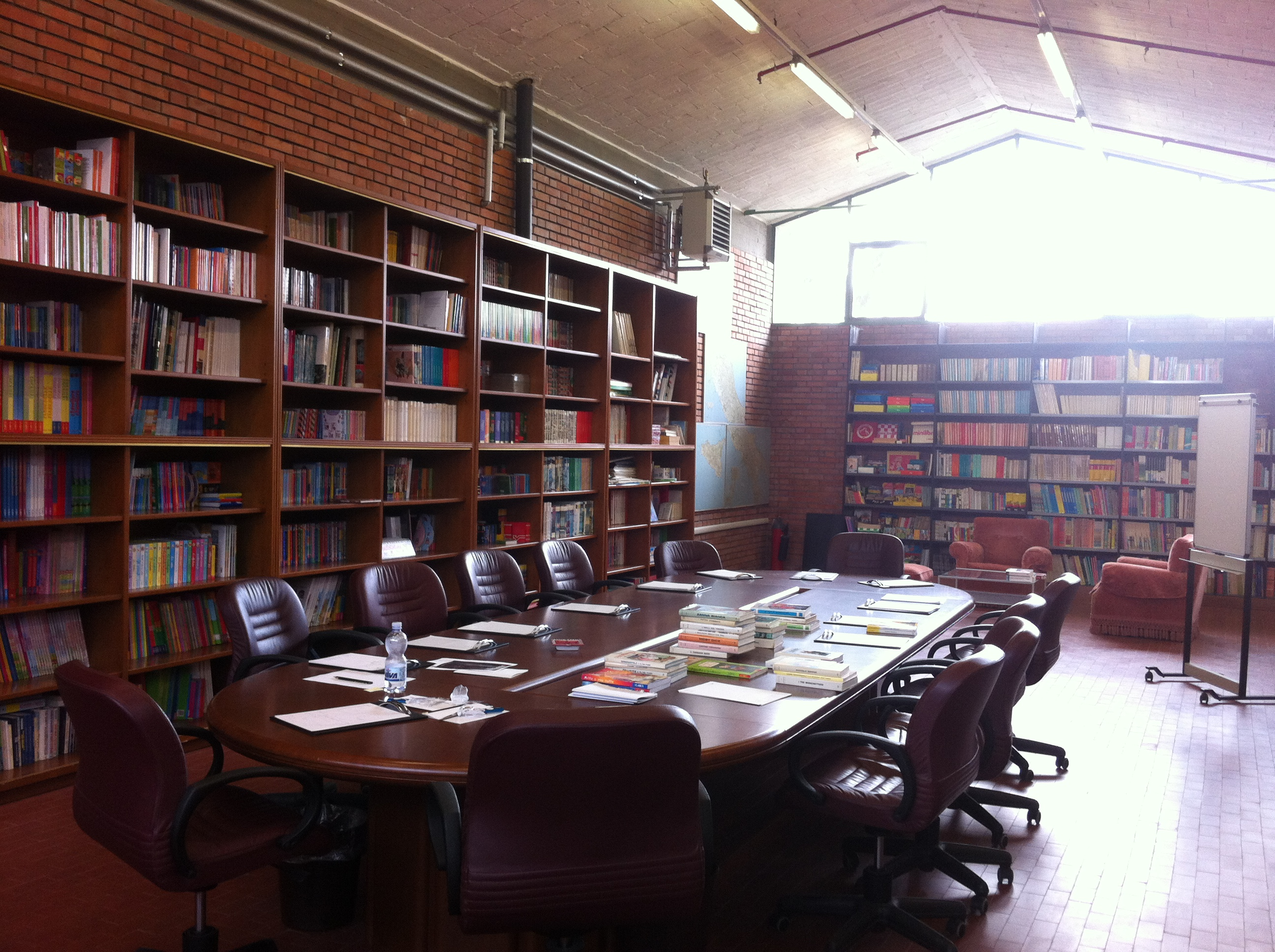 Roberto Maggi Editore